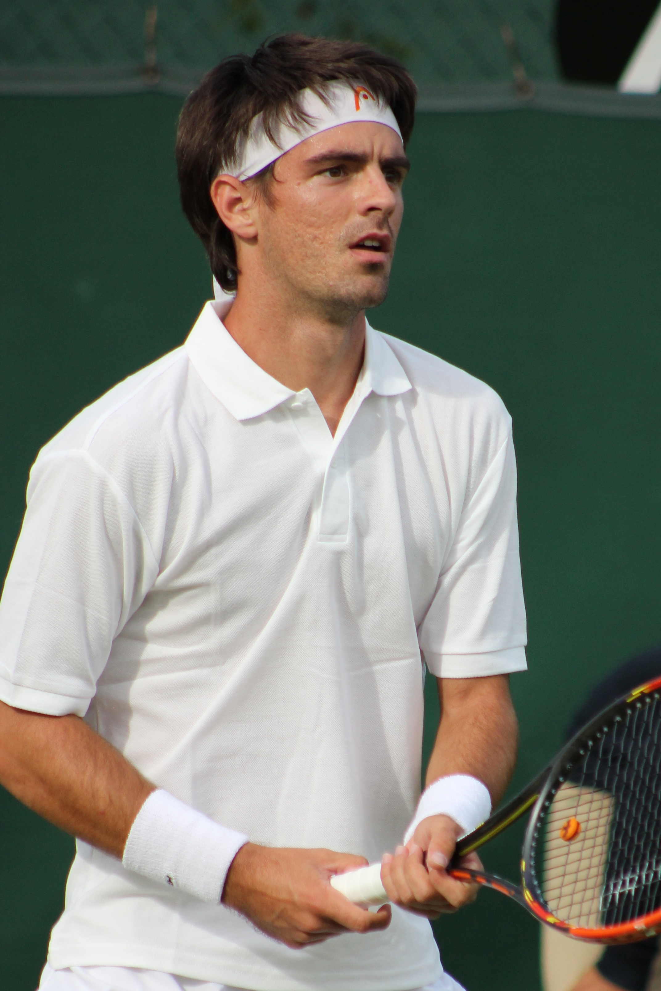 Elias WMQ15 (3)